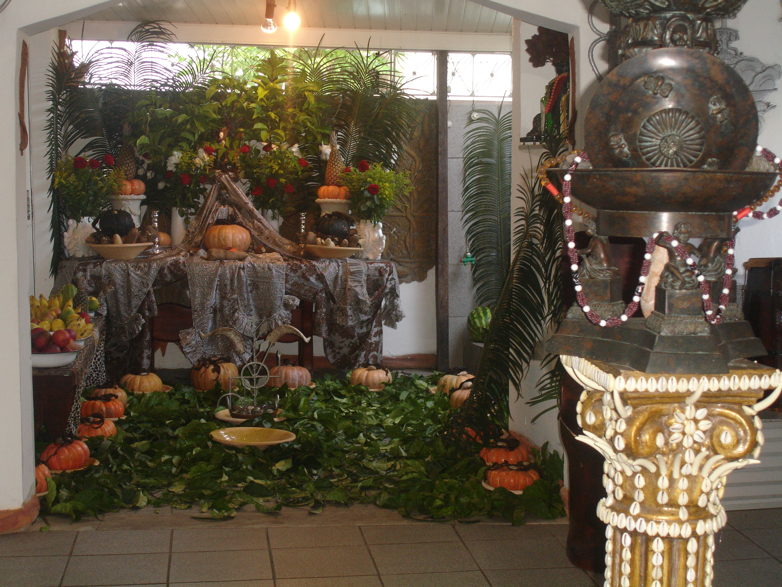 Oferenda de caboclo, Salvador, Brasil